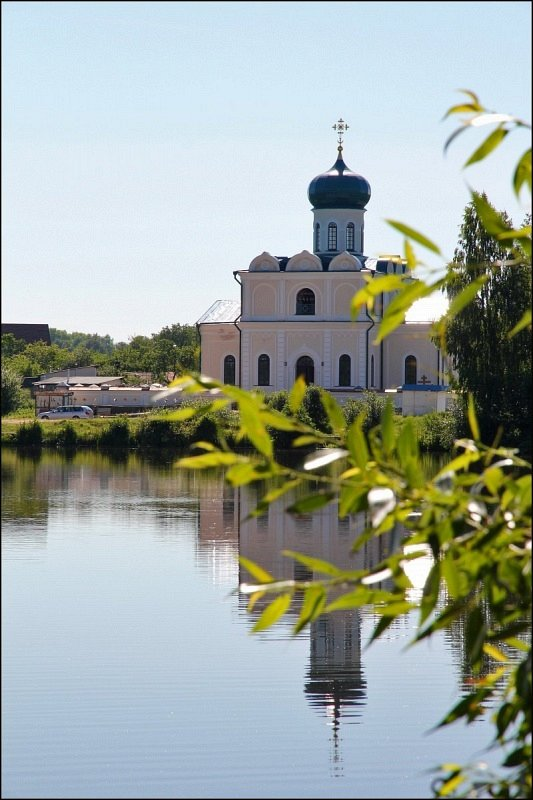 Станькава. Царква за ракой